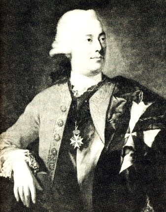 Portrait des Kabinettsministers Detlev Carl von Einsiedel.